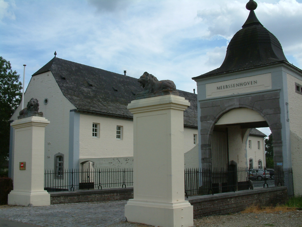 Kasteel Meerssenhoven te Itteren, Poortgebouw